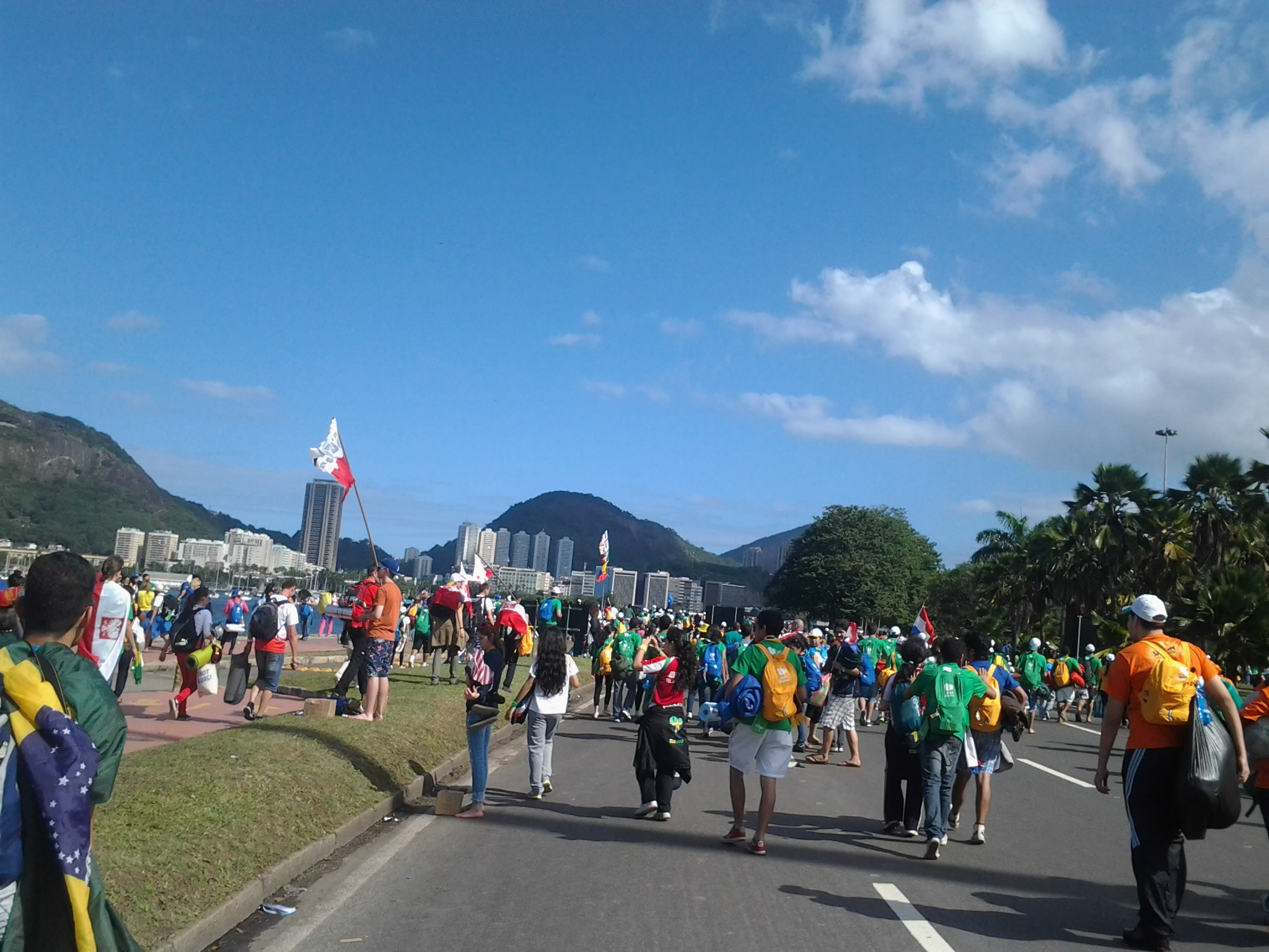 Em enceada de Bota Fogo em peregrinação rumo a Copacabana JMJ Rio2013